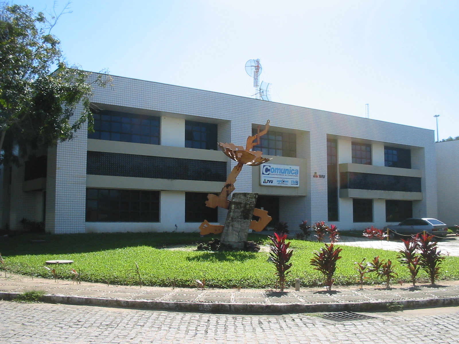 Natal (Rio Grande do Norte), Brasil. TV Universitária (TVU) da Universidade Federal (UFRN). Natal, Brazil. UFRN.